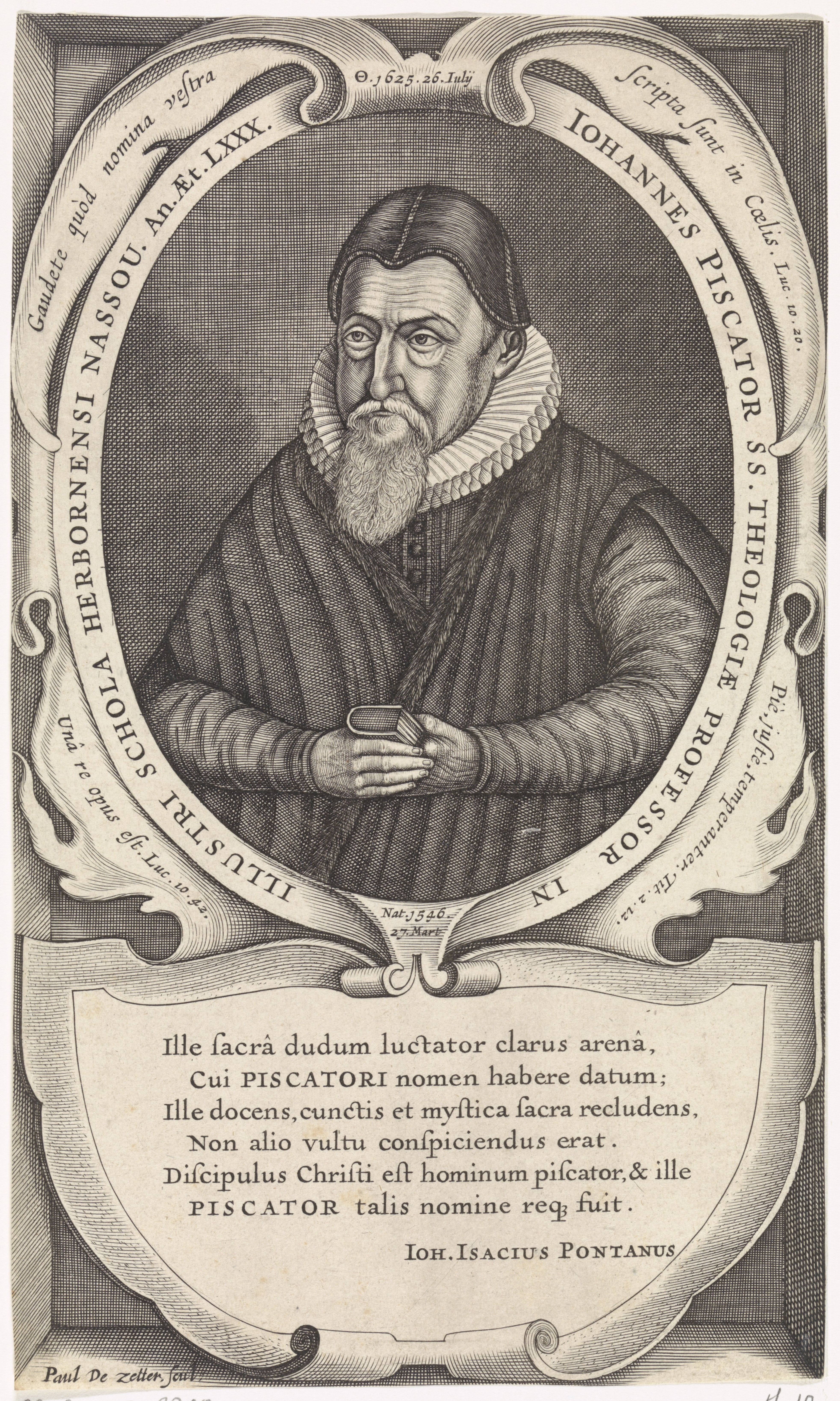 IdentificatieTitel(s): Portret van Johannes PiscatorObjecttype: prent Objectnummer: RP-P-1905-3790Catalogusreferentie: Hollstein Dutch 10Opschriften / Merken: verzamelaarsmerk, verso, gestempeld: Lugt 2228Omschrijving: Portret van Johannes Piscator, theoloog en bijbelvertaler, met een Bijbel in zijn handen. Onderaan een cartouche met een zesregelige tekst in het Latijn.VervaardigingVervaardiger: prentmaker: Paul de Zetter (vermeld op object)schrijver: Johannes Isacius Pontanus (vermeld op object)Plaats vervaardiging: DuitslandDatering: 1625 - 1667Fysieke kenmerken: gravureMateriaal: papier Techniek: graveren (drukprocedé)Afmetingen: blad: h 237 mm × b 140 mmOnderwerpWie: Johannes PiscatorVerwerving en rechtenVerwerving: aankoop 1905Copyright: Publiek domein